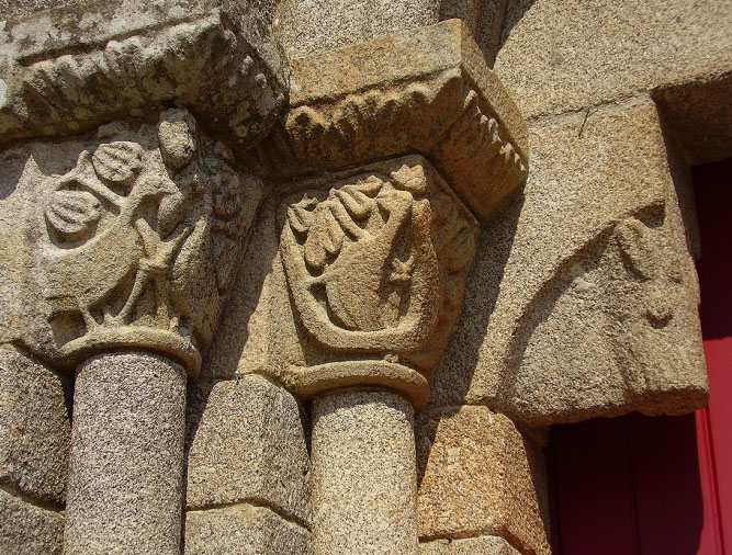 Capiteis do portal da Igreja de Cabeça Santa em Penafiel Igreja românica composta por uma só nave rectangular, com capela-mor quadrangular separada da nave por arco cruzeiro de volta perfeita, assente sobre colunas com capitéis e impostas decorados com motivos fito e zoomórficos. No portal axial predomina o mesmo tipo de decoração zoomórfica. This file was uploaded for Wiki Loves Monuments in Portugal with the unique identifier 70702.